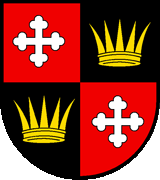 Wappen von Verossaz Kanton Wallis Schweiz